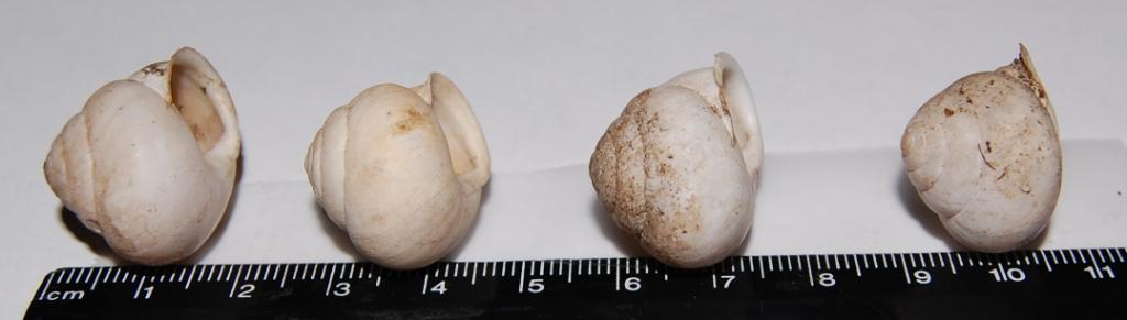 Marmorana sicana Fèrussac, 1822 Monte Pellegrino, Palermo